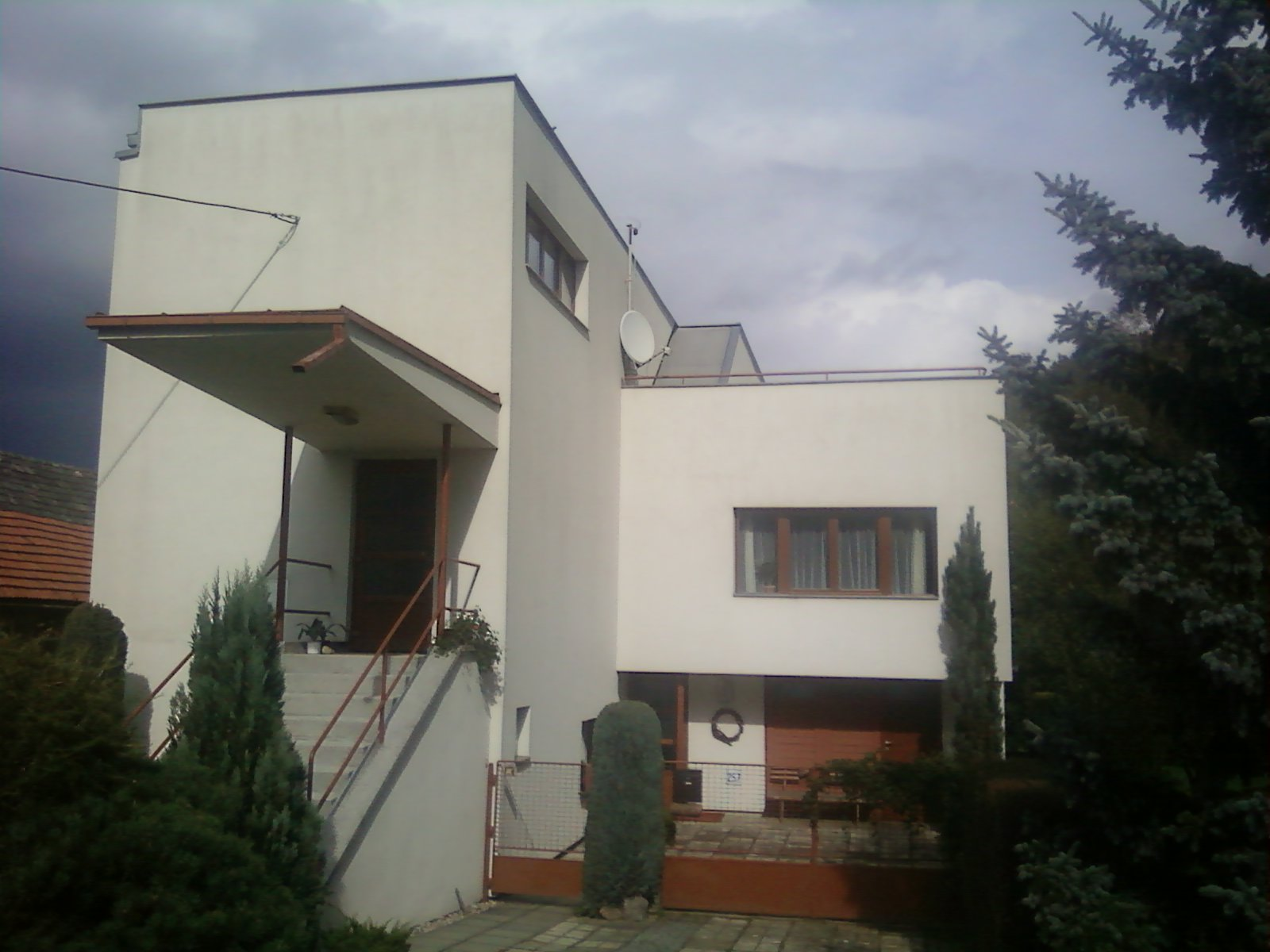 Funkcionalistická vila Josefa Železného, Dolní čp. 257, Jimramov.